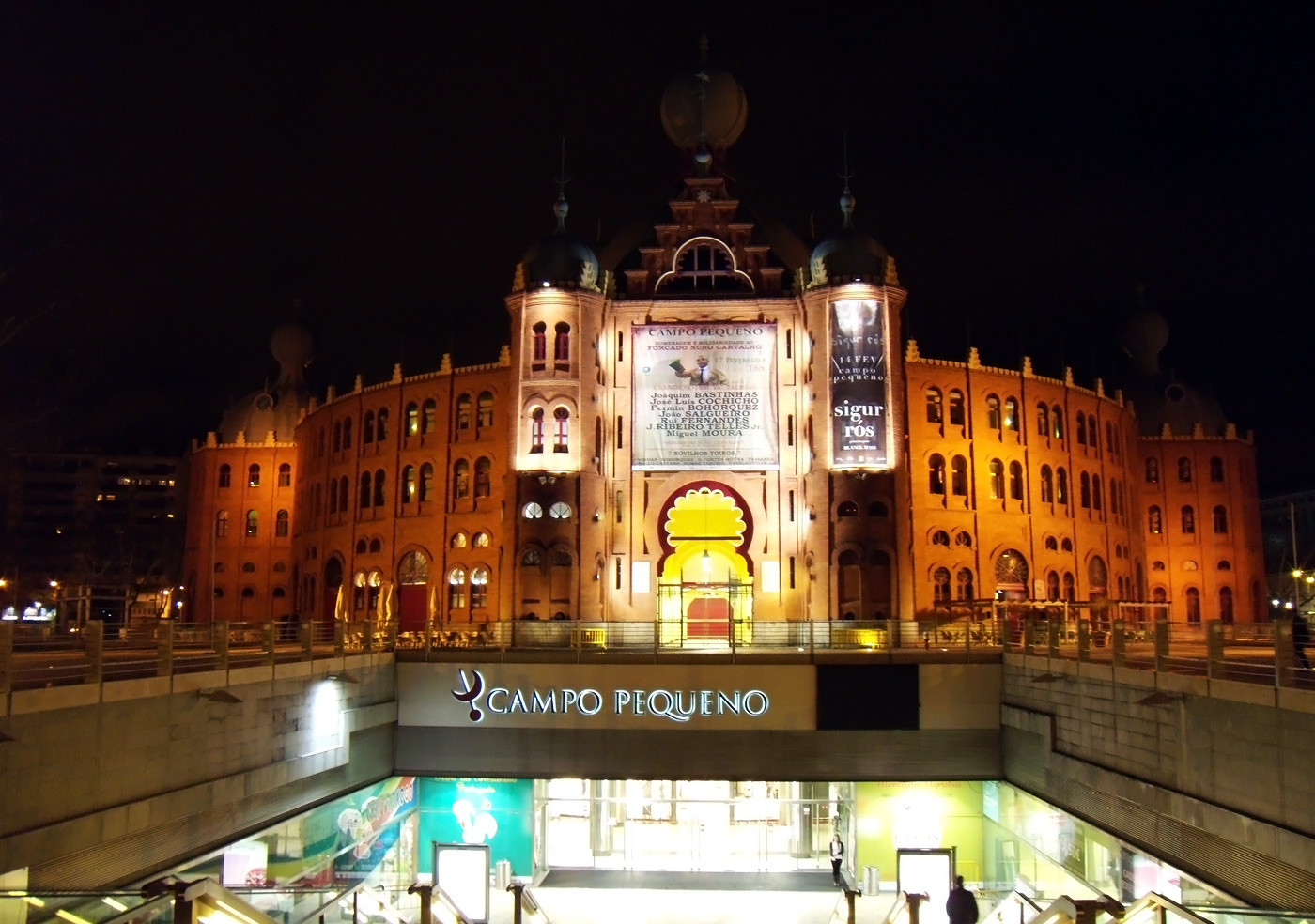 Торрада - португальская коррида, в которой нельзя убивать быков.